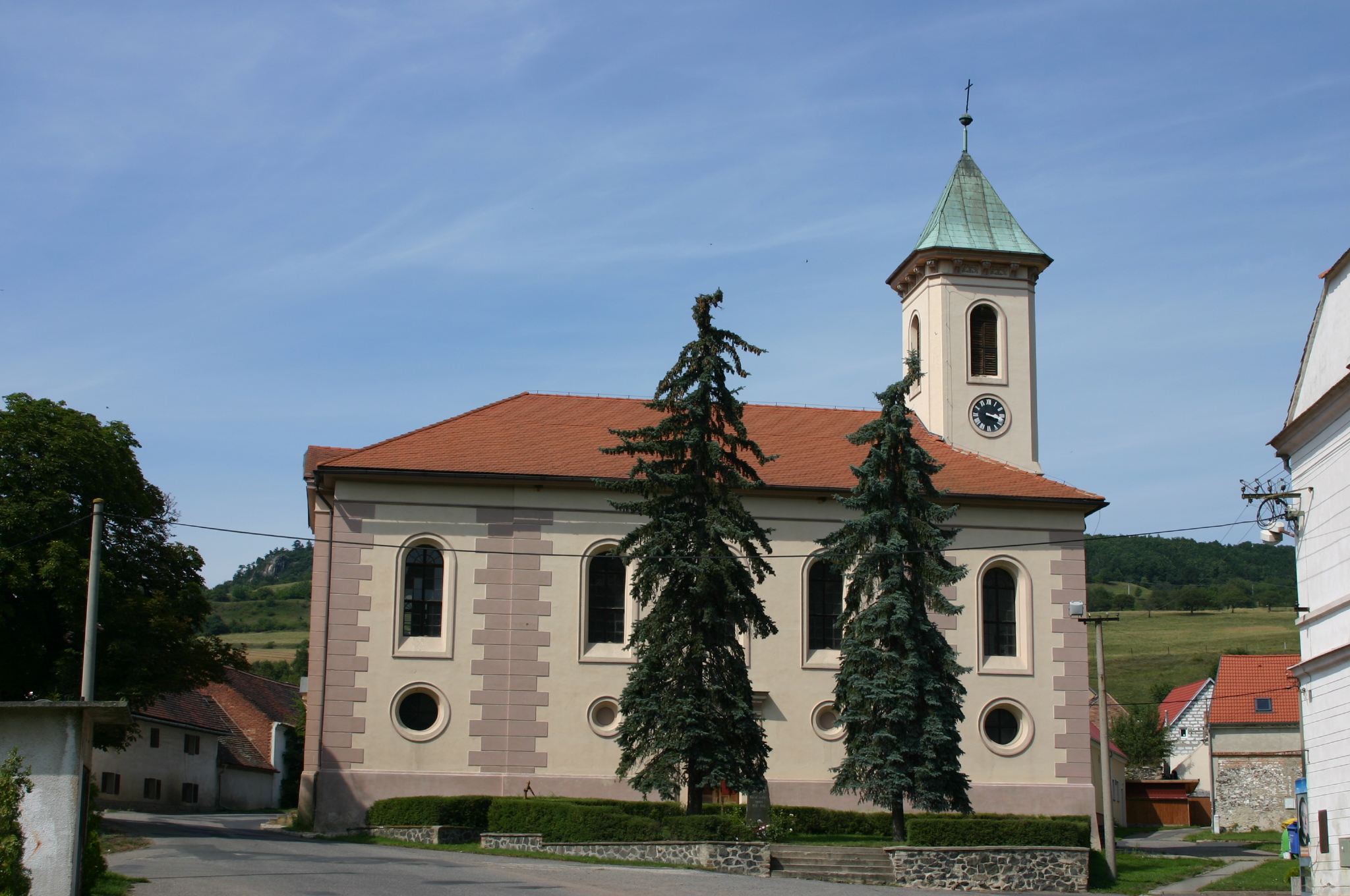 Česky: Obec Želenice v okrese Most - kostel